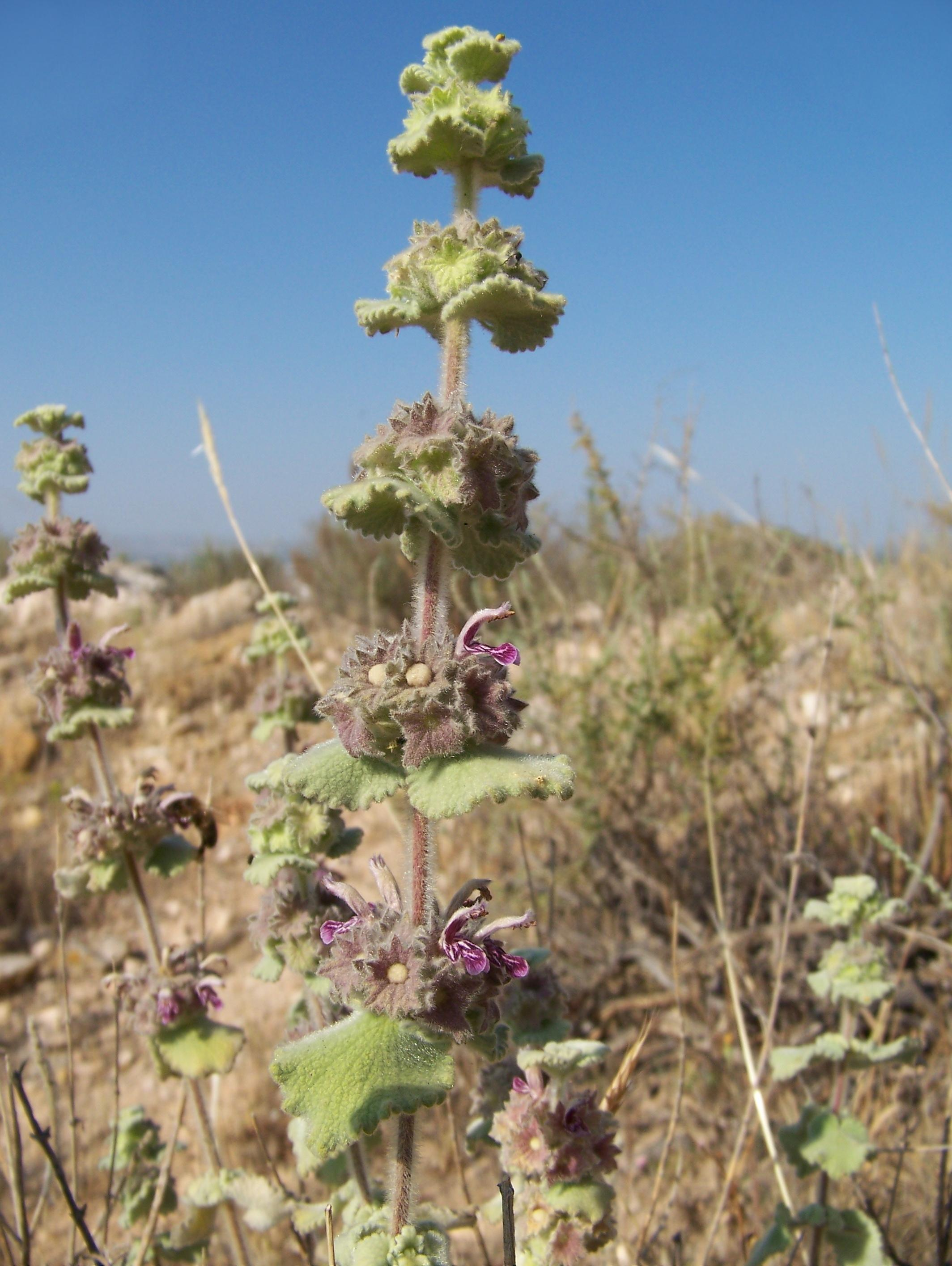 Ballota hirsuta (marrubio, manrubio) : escapo floral - Cabezo de los Ojales, Albatera (Alicante, España).